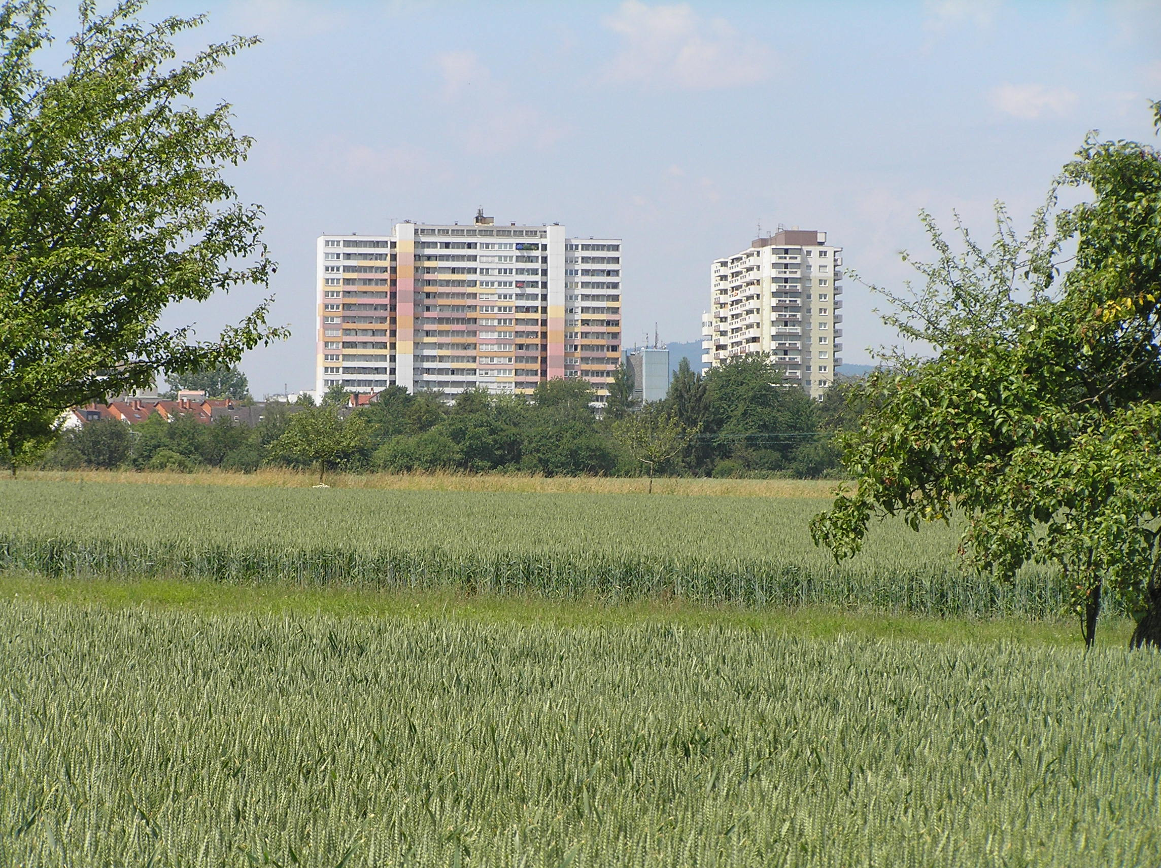 Wohnhochhäuser in Frankfurt am Main, Ortsteil Nieder-Eschbach, Homburger Landstrasse. Die auffällig angestrichenen Häuser sind aus allen Himmelsrichtungen weithin sichtbar. Hier eine Aufnahme von Harheim aus.